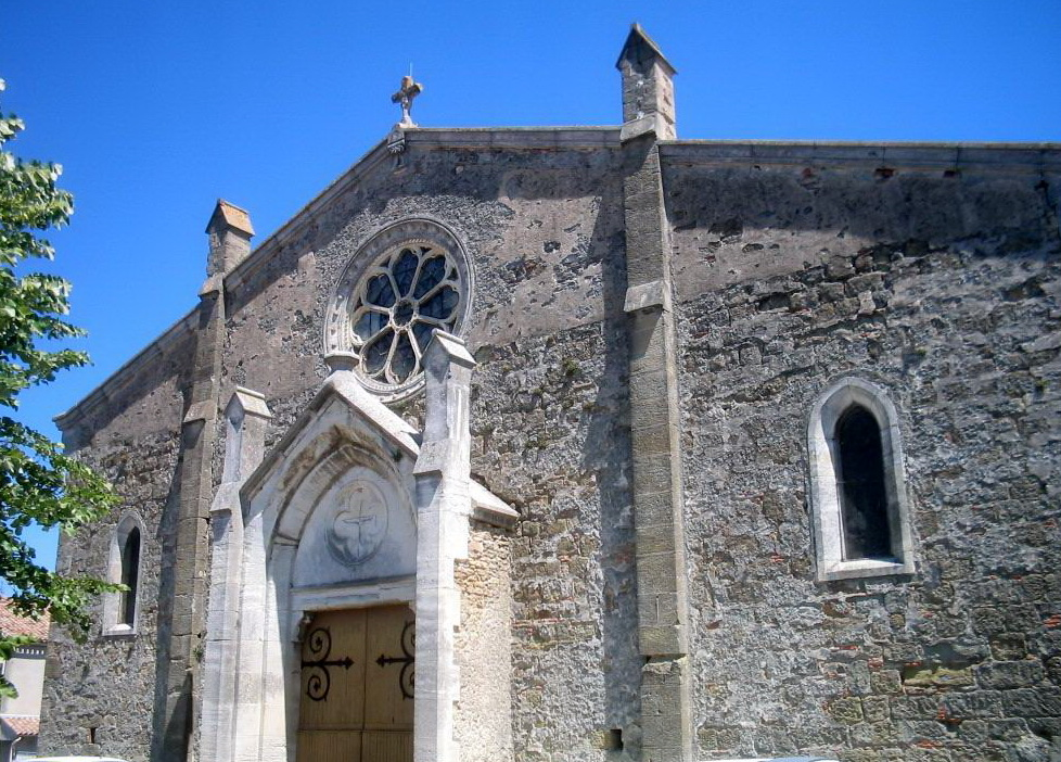 Église Saint-Julien à Bram